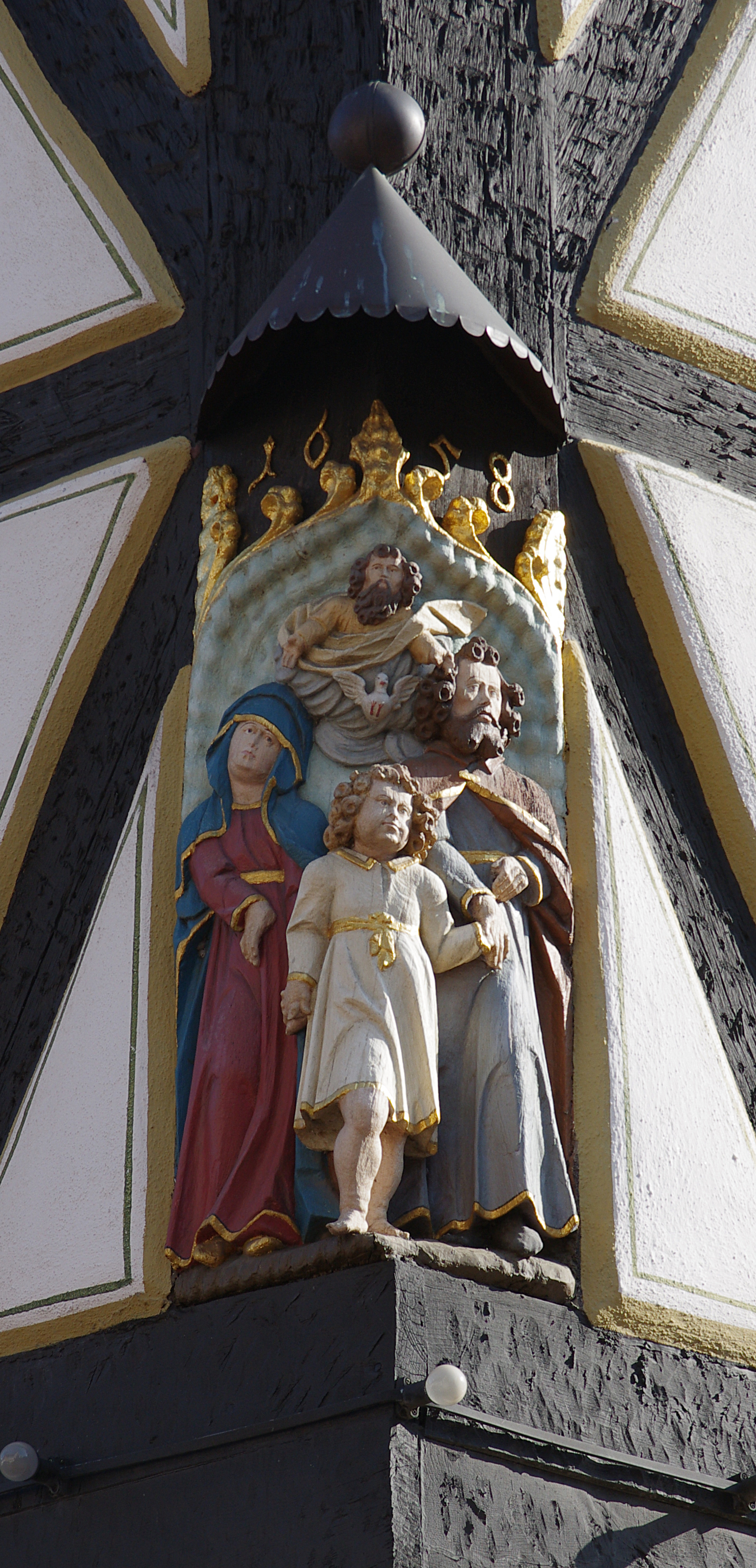 Figurengruppe an einem Erker in Ettenheim